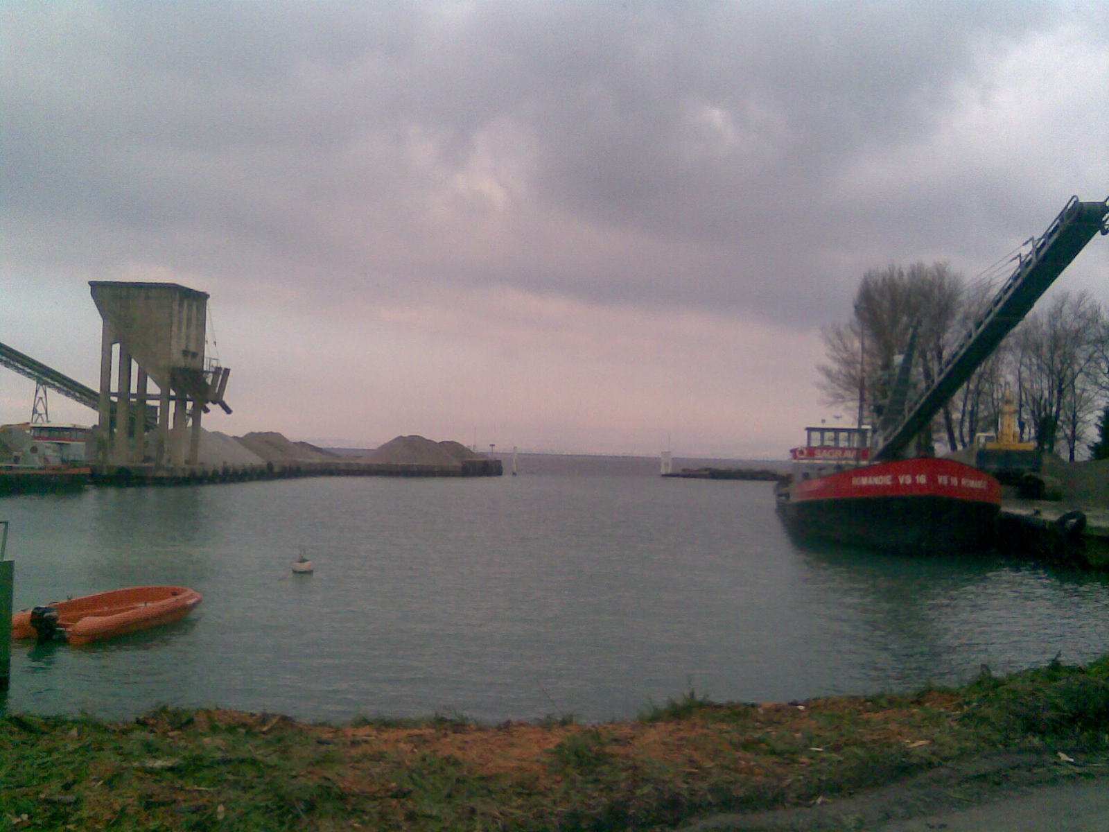 Le port Pinard à Amphion-les-bains. A gauche, le site de la société d'exploitation des graviers de la Dranse (Sagradranse)